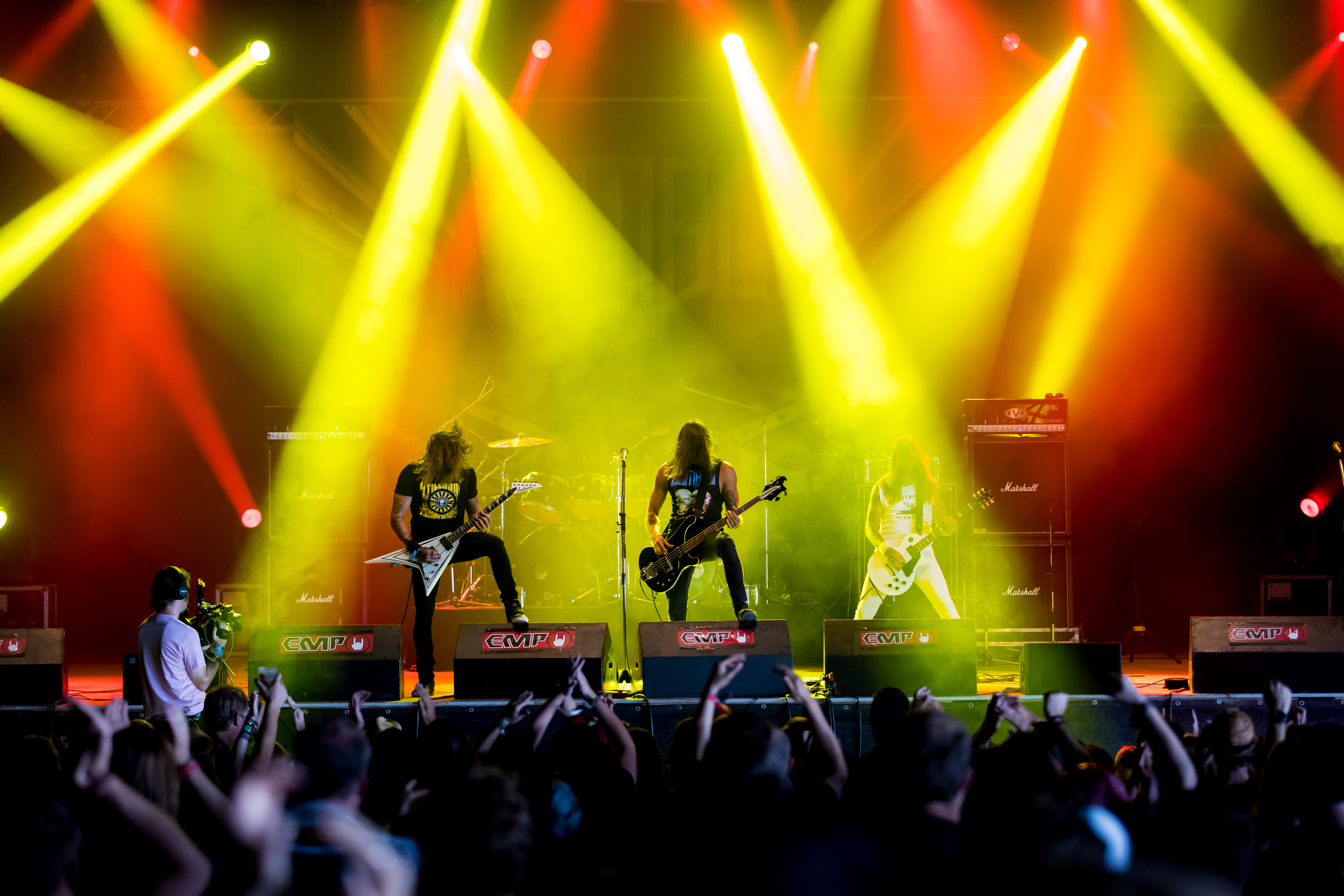 Bombus during Summer Breeze 2016 at , Dinkelsbühl, Bayern, Germany on 2016-08-19, Photo: Sven Mandel